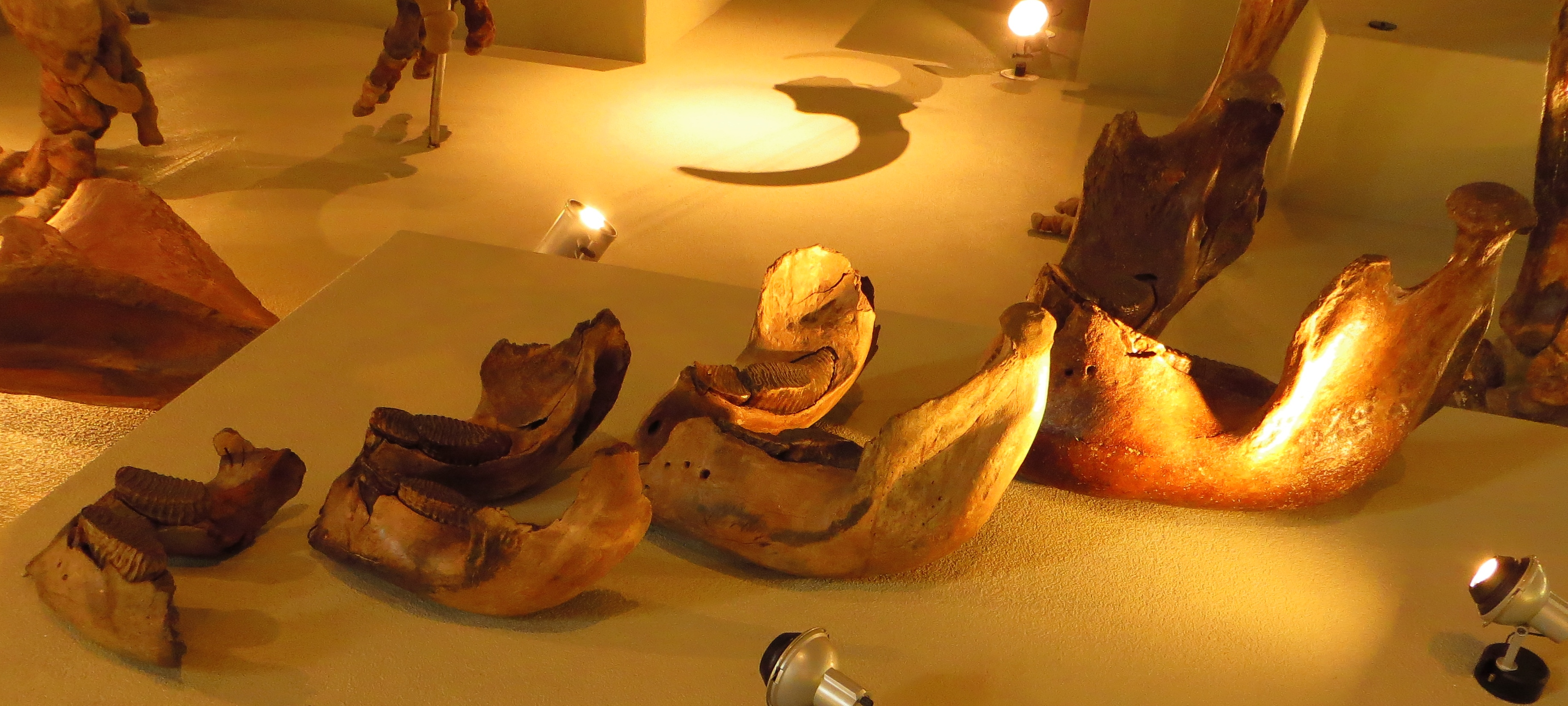 Fossil of Mammuthus, an extinct mammal - Took the picture at Naturalis, Leiden